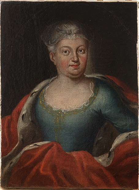 Wiktoria z Leszczyńskich Potocka. (Muzeum pałacu króla Jana III Sobieskiego w Wilanowie)